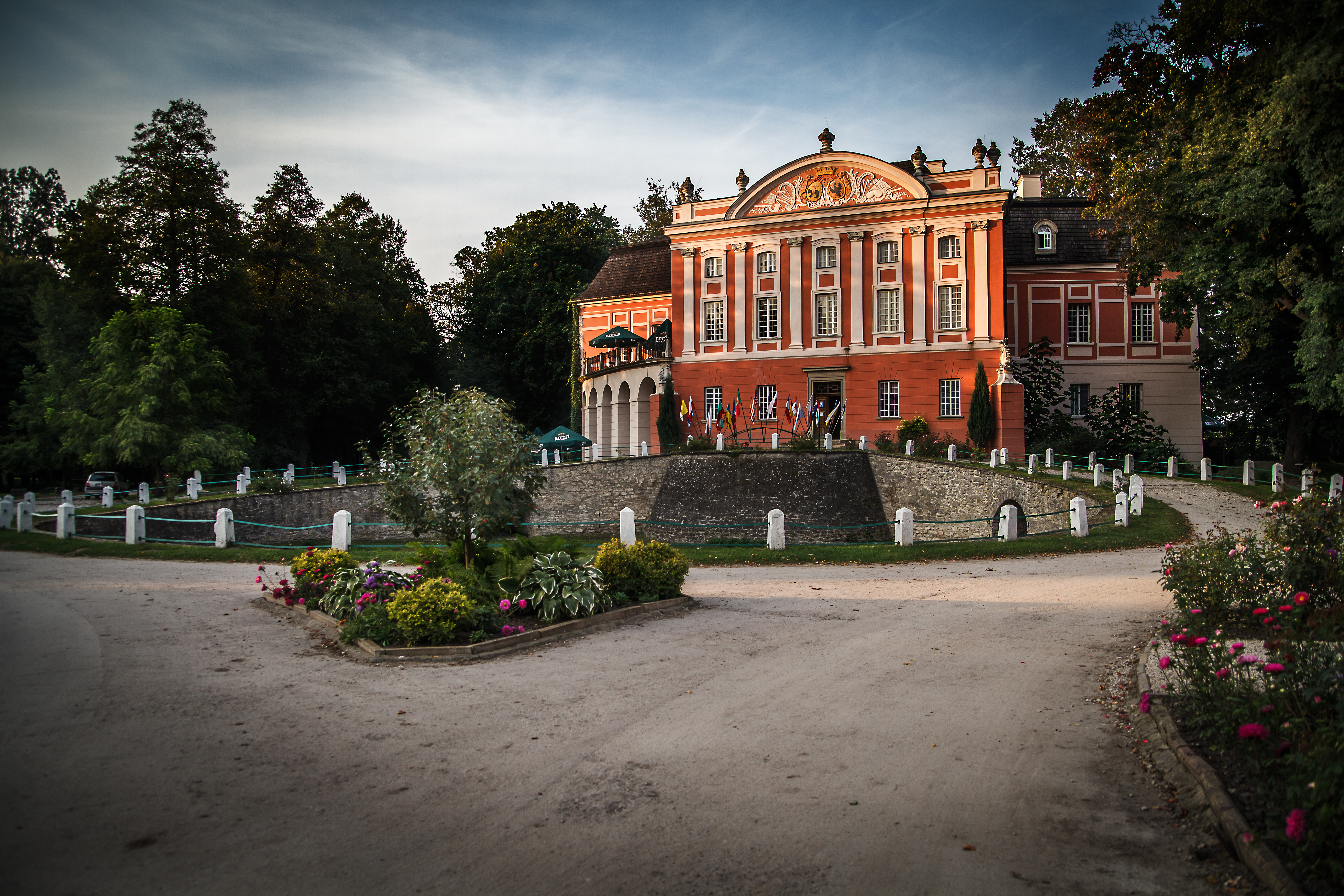 Kurozwęki - zamek, następnie pałac, 2 poł. XIV, XV, XVII, 2 poł. XVIII w.